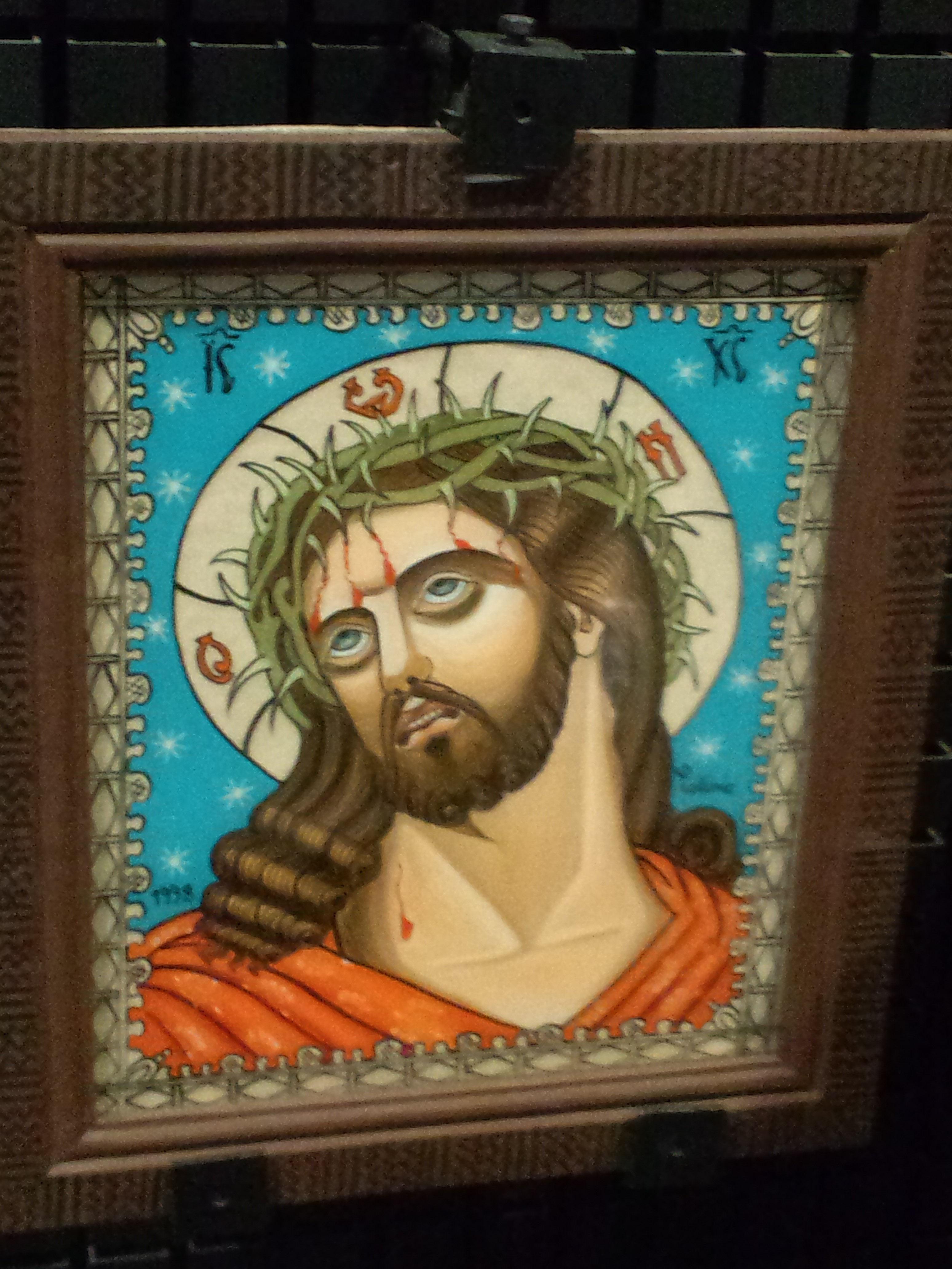 国立民族学博物館（大阪） ガラスイコン「荊（いばら）のイエス」（ルーマニア、制作者：モラル・ゲオルゲ、1997年収集）